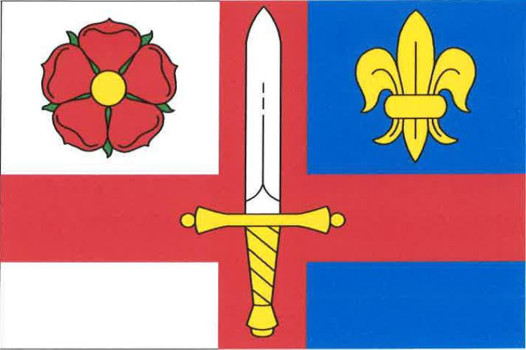 vlajka Strýčice